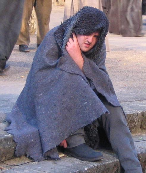 Thomas Coenen bei Les Miserables